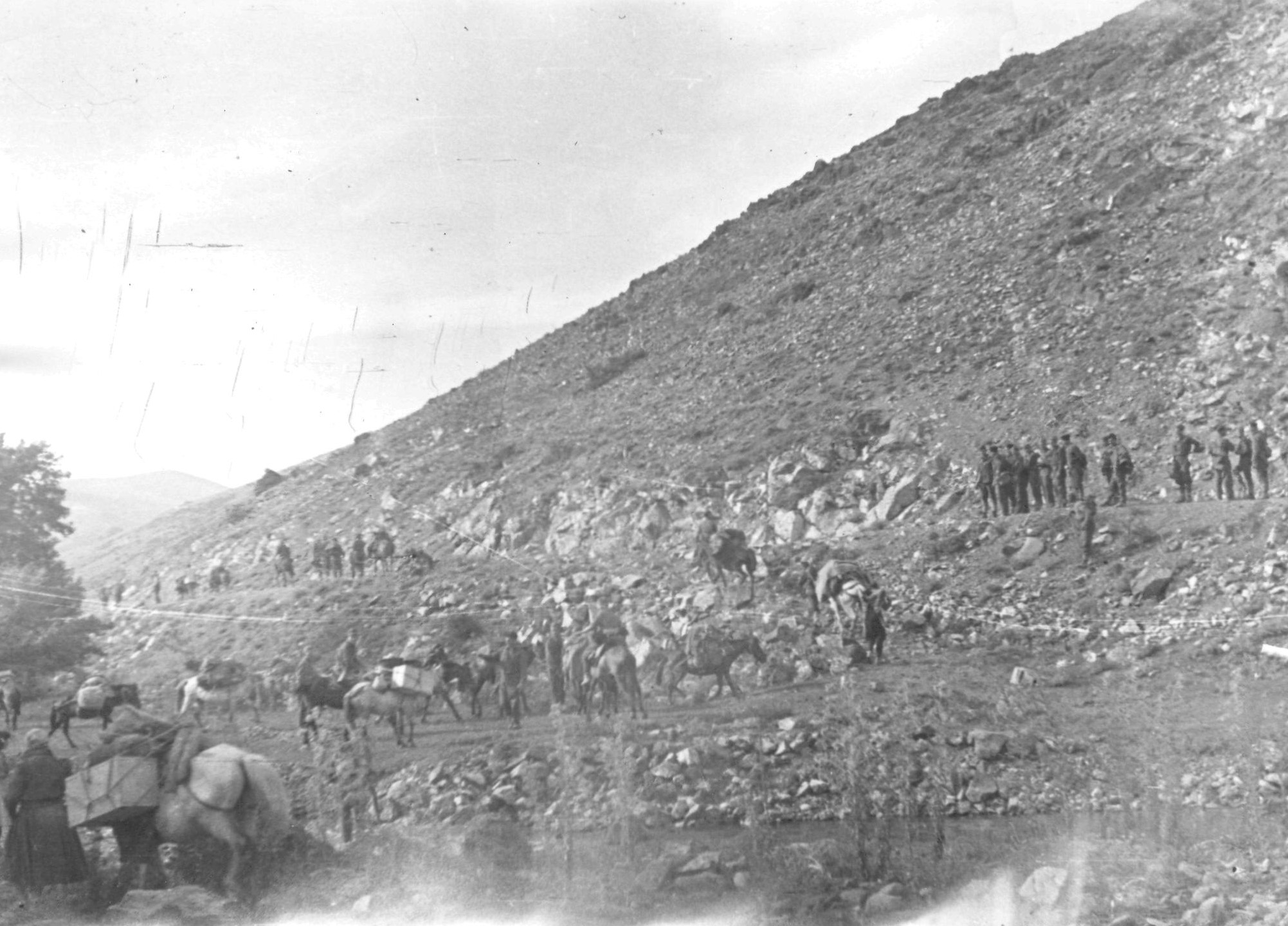 Srpskohrvatski / српскохрватски: Operativna grupa divizija NOVJ u Srbiji, avgusta 1944. Partizanske snage prelaze u Toplicu, posle prelaska Ibra.